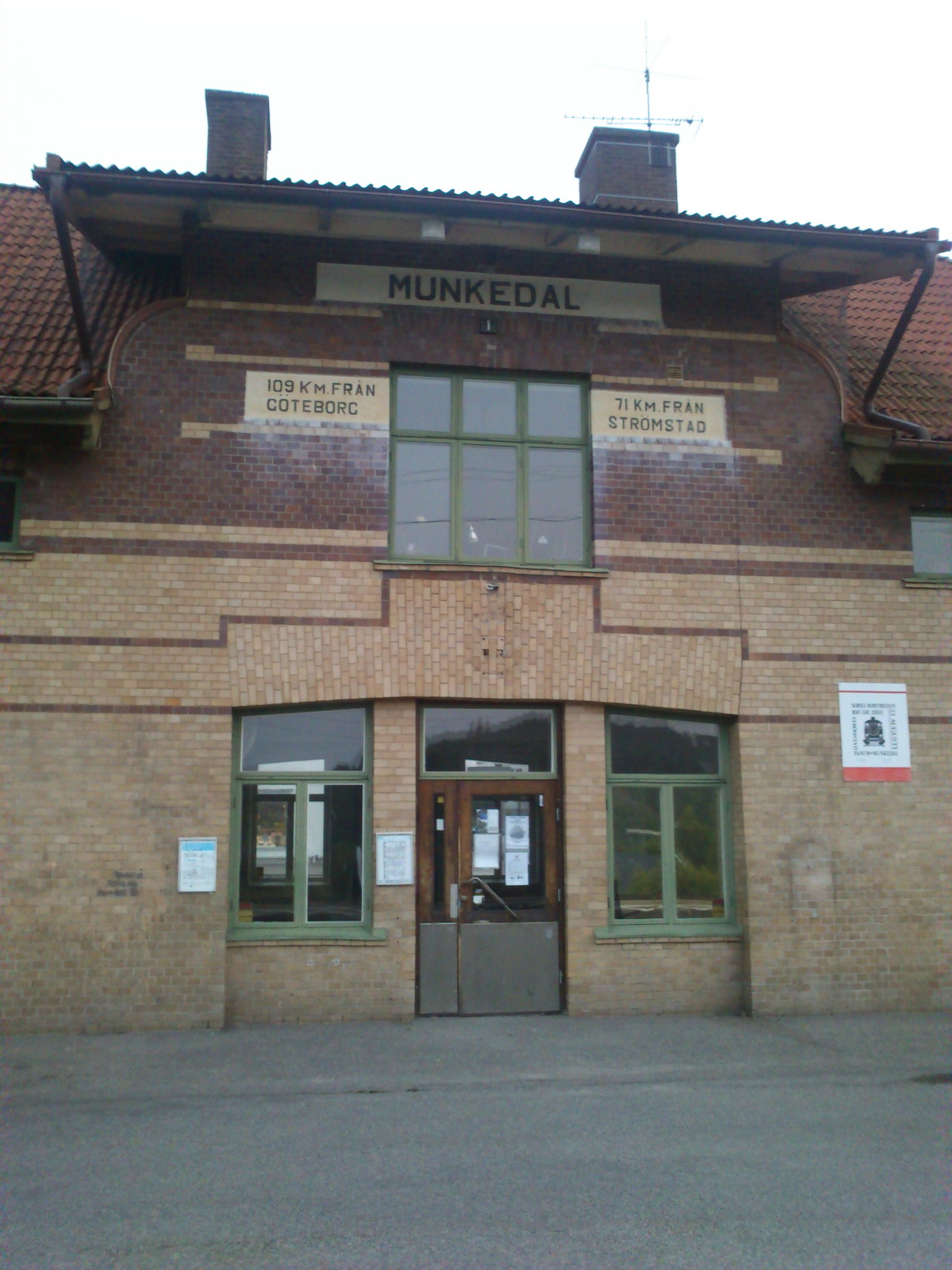 Munkedal station